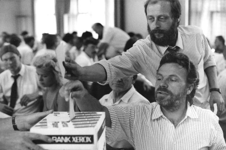 ADN-Bernd Settnik-Berlin: DA-Parteitag. 75 Prozent der Delegierten des Sonderparteitages stimmten für die Fusion des DA mit der CDU. Damit wurde die erforderliche Mehrheit von zwei Dritteln der Stimmen knapp erreicht.